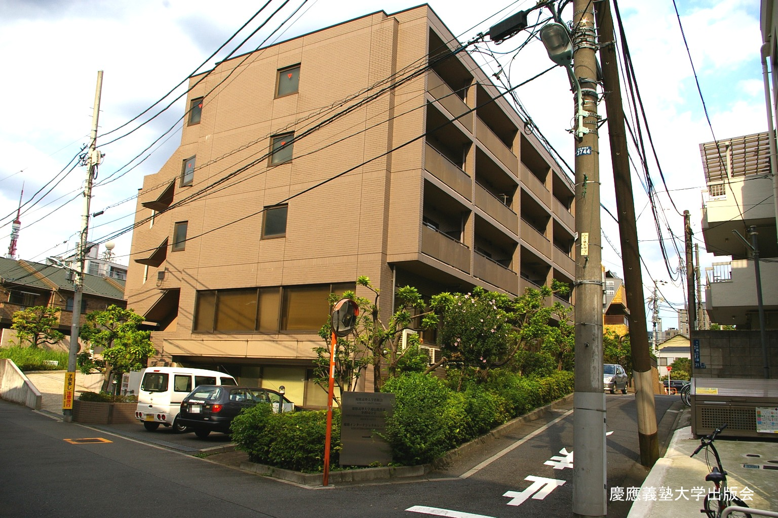 2009.5日本国内で塾生 (talk)が撮影。